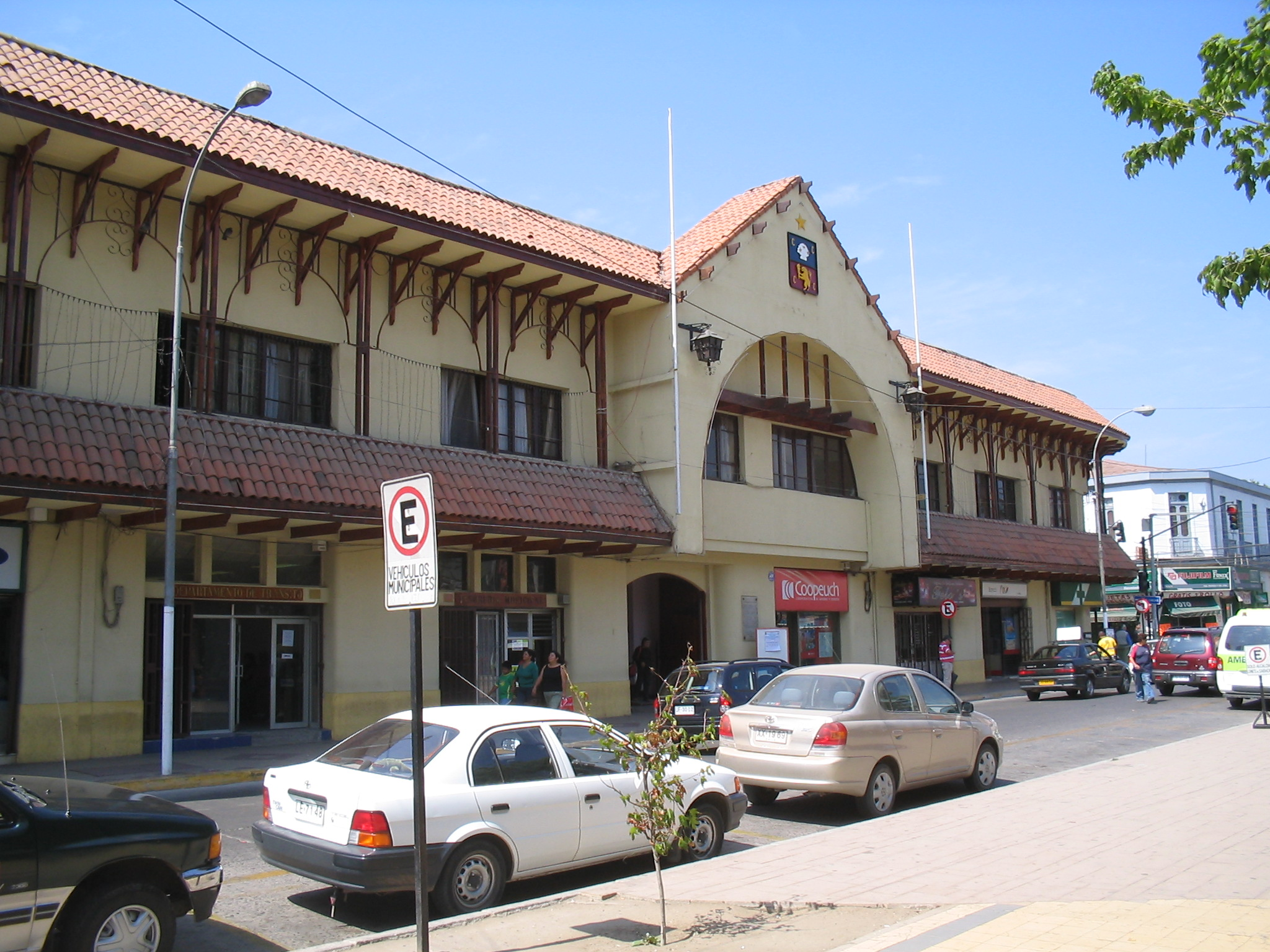 Edificio Consistorial de la Municipalidad de Quillota